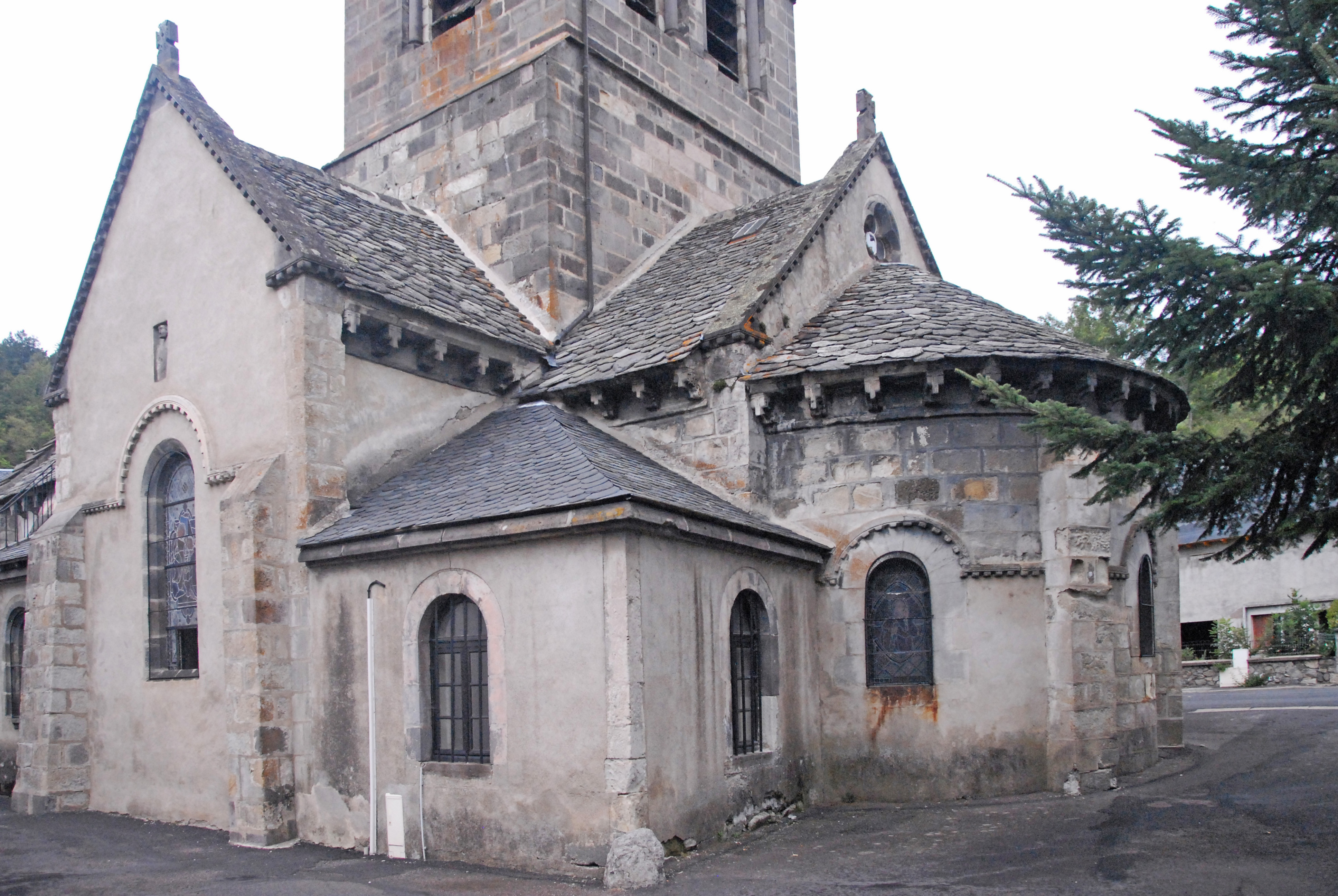 Dorfkirche Chambon-sur-Lac, Chorthaupt v. SO